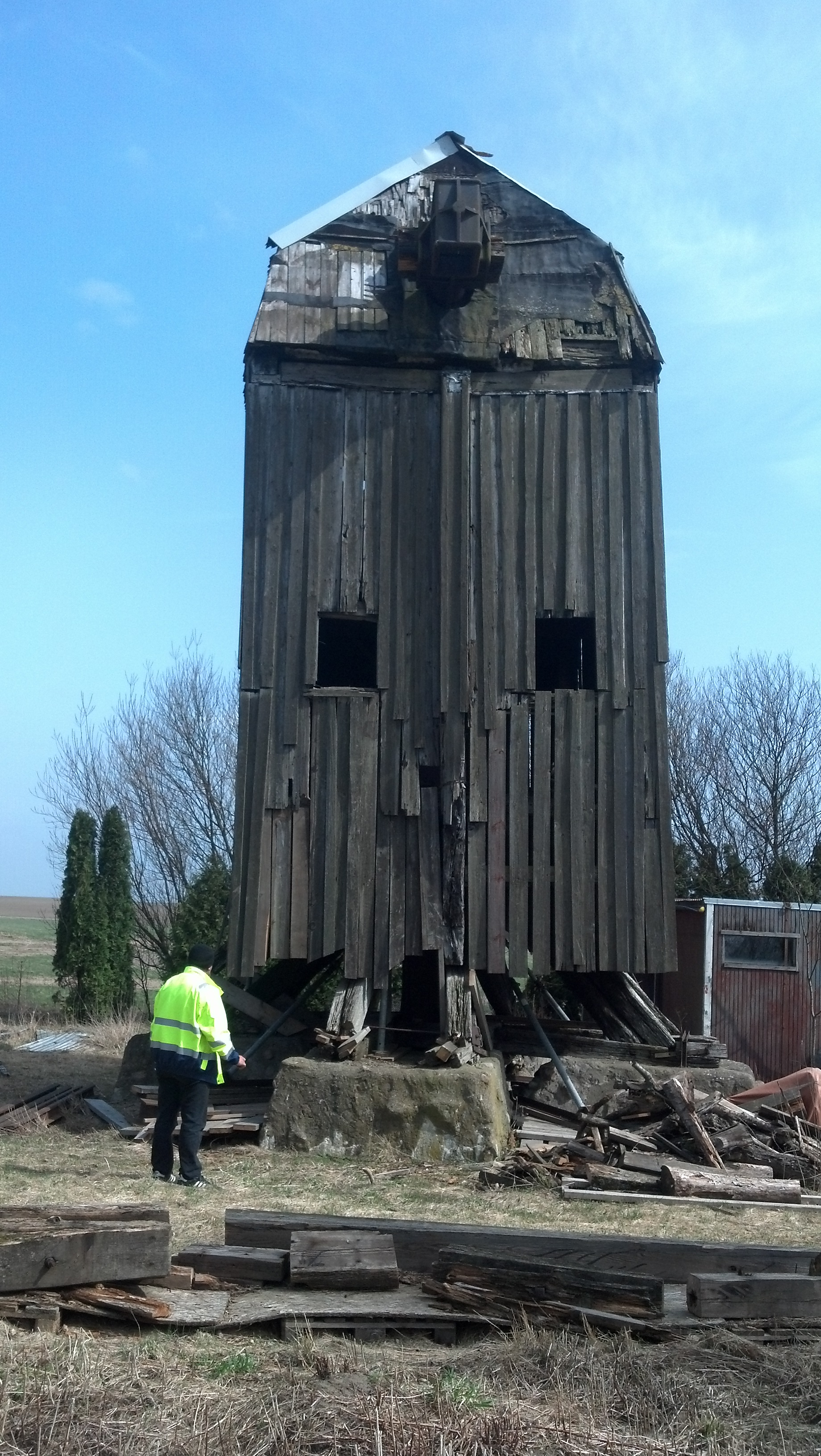 Väderkvarn av timmerkonstruktion, fodrad med ribb på lock,4.5x3.5 m och täckt av brutet tak av ribb på lock. Trapphus medribb på lock. Bevarade vingar. Omålad 16-1700-tal. Hitflyttadfrån Viderups gods omkring 1870 och såldes 1950 till föreningenDet gamla Lund.